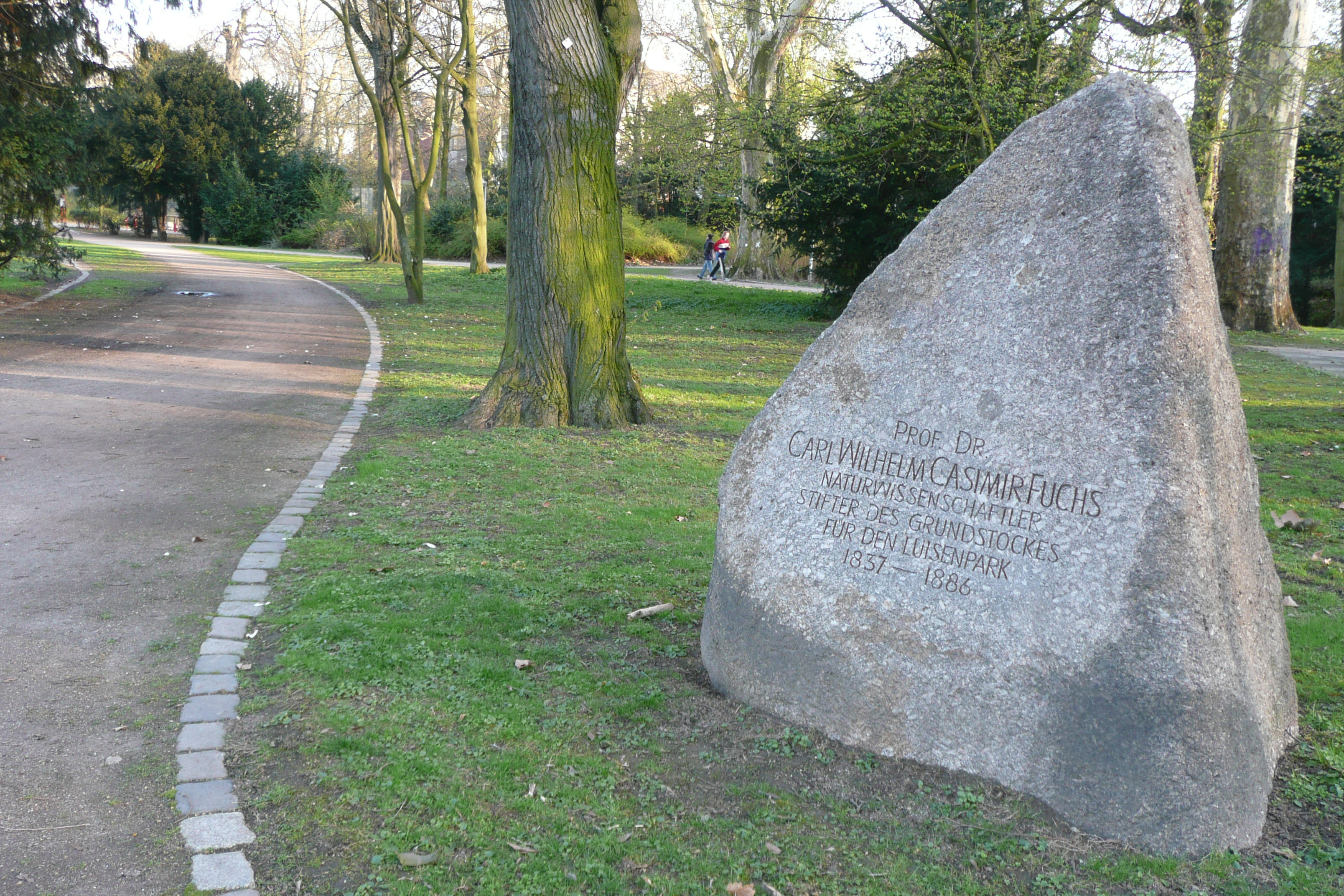 Gedenkstein für Prof. C.W.C. Fuchs